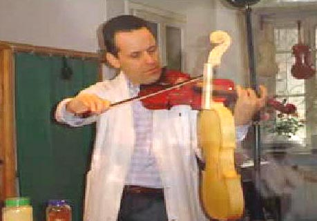 E Geiebauer vu Cremona .